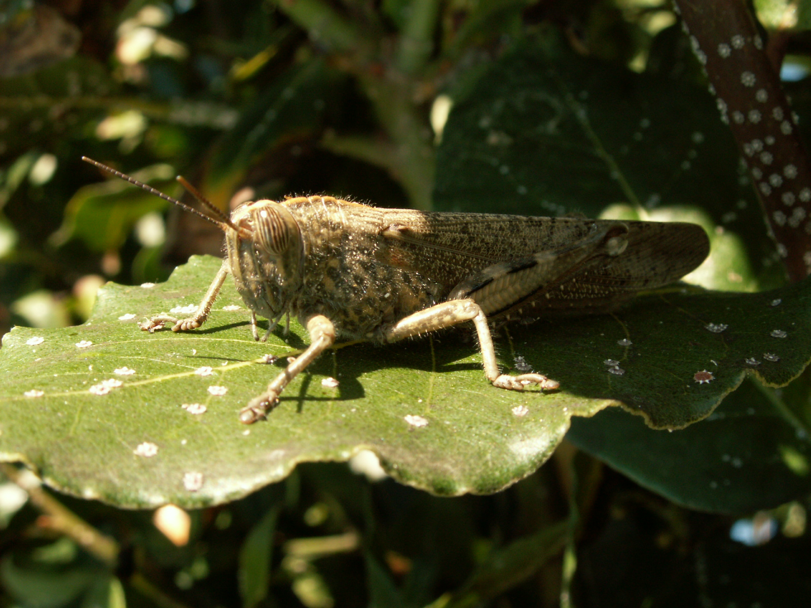 Ägyptische (Wanderheu- oder) Knarrschrecke (Anacridium aegyptium) in Italien, etwa 10 cm lang